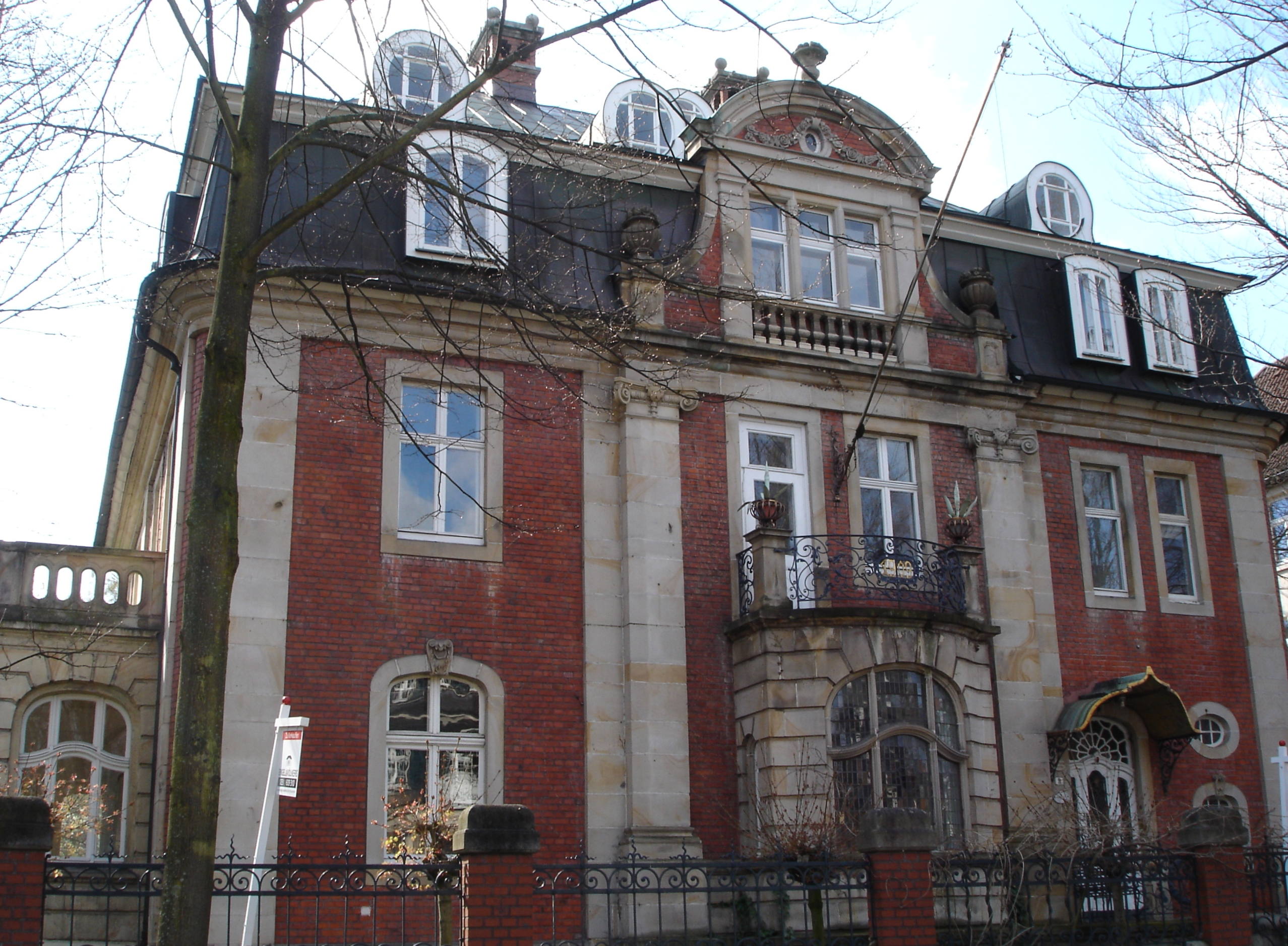 Villa Sunder-Plaßmann in Münster, Westphalia, Germany